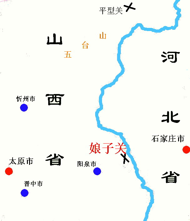 涓生自制